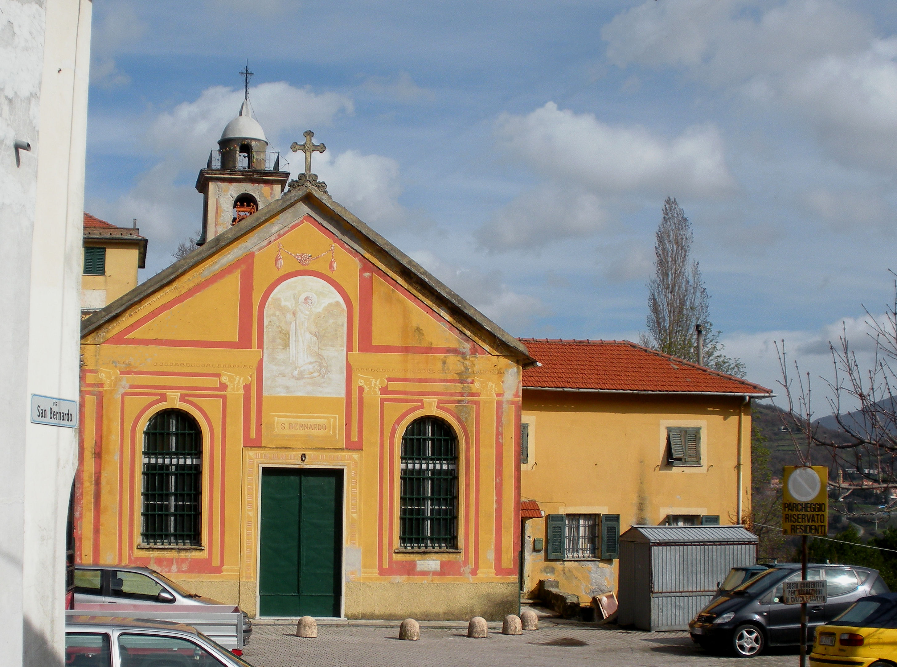 La chiesa di N.S. del Rosario e San Bernardo (Torrazza, comune S.Olcese, prov. Genova) Foto propria Marzo 2010